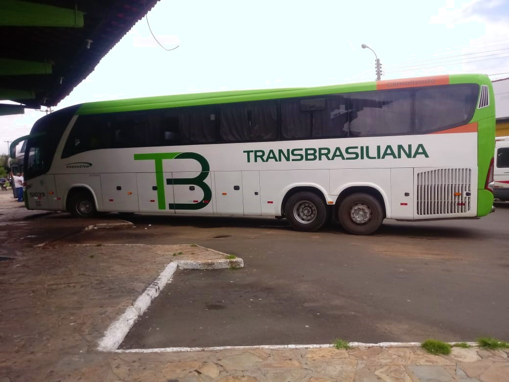 ônibus da Transbrasiliana em um terminal rodoviário.